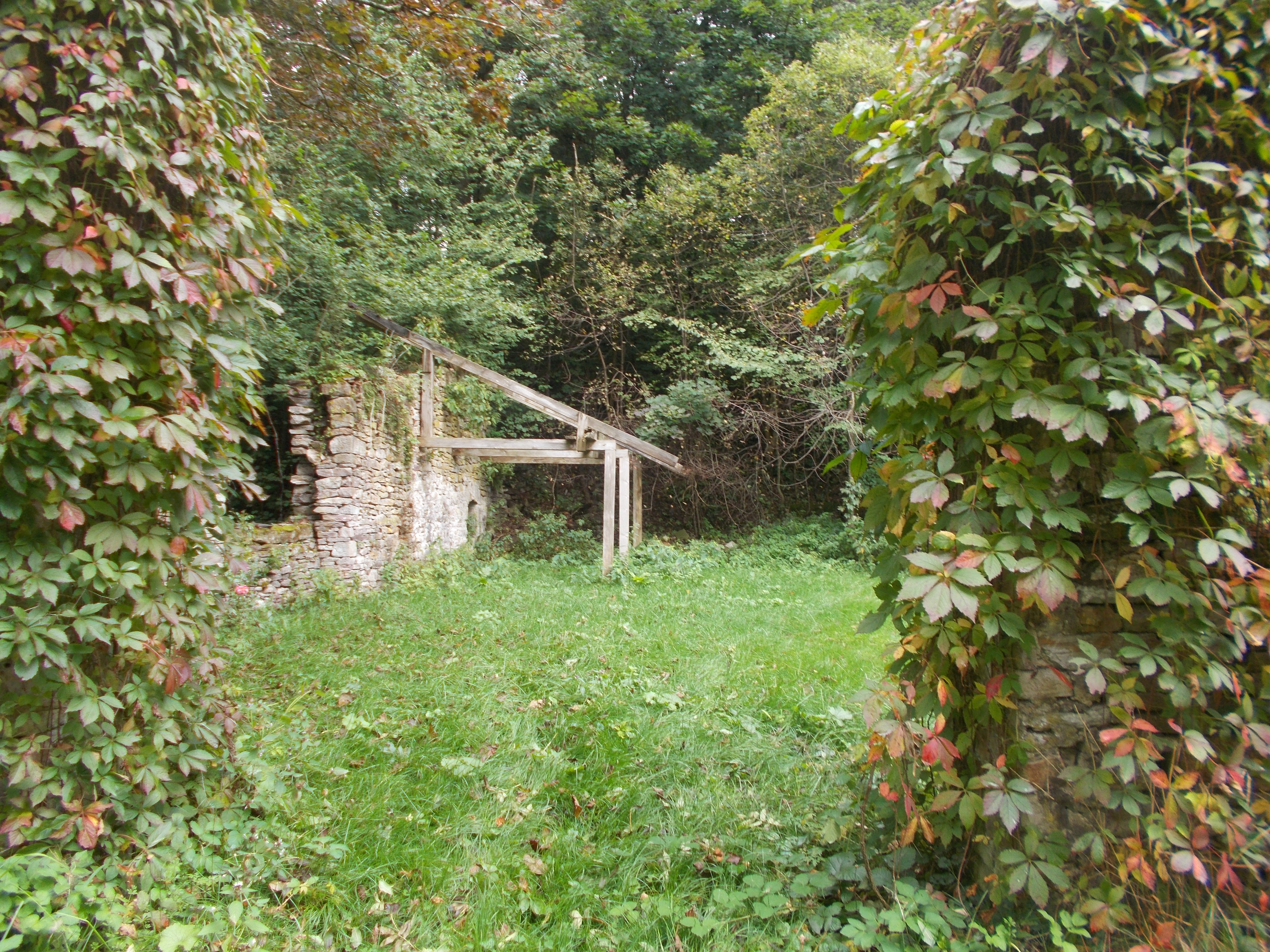 von Bruchsteinmauer umgebenes Gelände und Baulichkeiten der früheren Erzhütte Nr. 1: ehemaliges Kleinwarenlager (1771) Nr. 3: Herrenhaus; Mansarddachbau, Seitenrisalite (drittes Drittel des 18. Jahrhunderts) Nr. 3a: Verwaltungs- und Gästehaus; Stall- und Remisengebäude (ab 1772) Nr. 5: Wohn- und Produktionsbau Reste des eisernen oberschlächtigen Wasserrads (zweite Hälfte des 19. Jahrhunderts) gusseiserne Brücke (um 1800) Reste des Hochofens (Anfang des 19. Jahrhunderts) Lauf des Traunbachs, Weiher, Landschaftsgarten